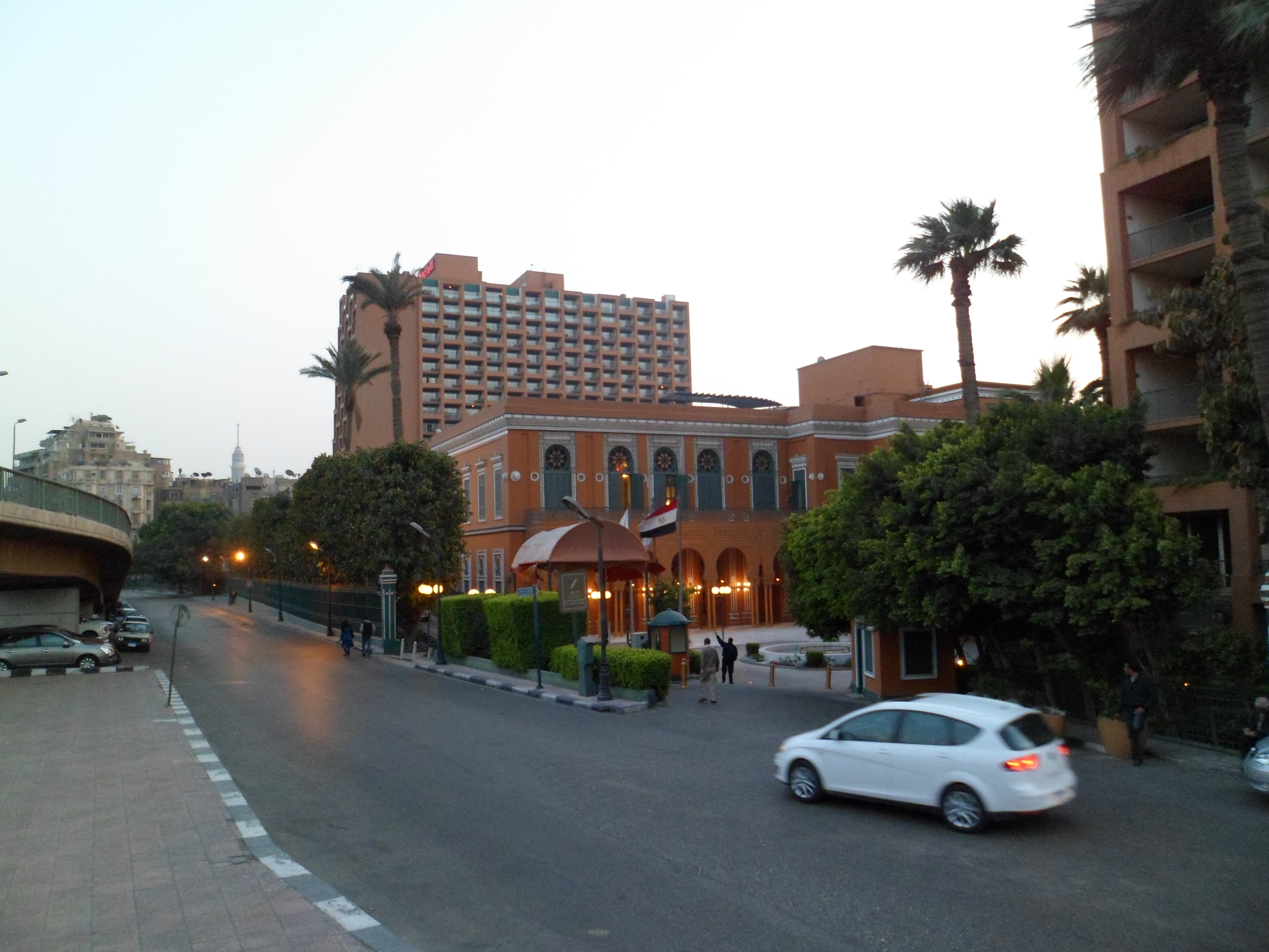 أحد شوارع الزمالك، القاهرة.